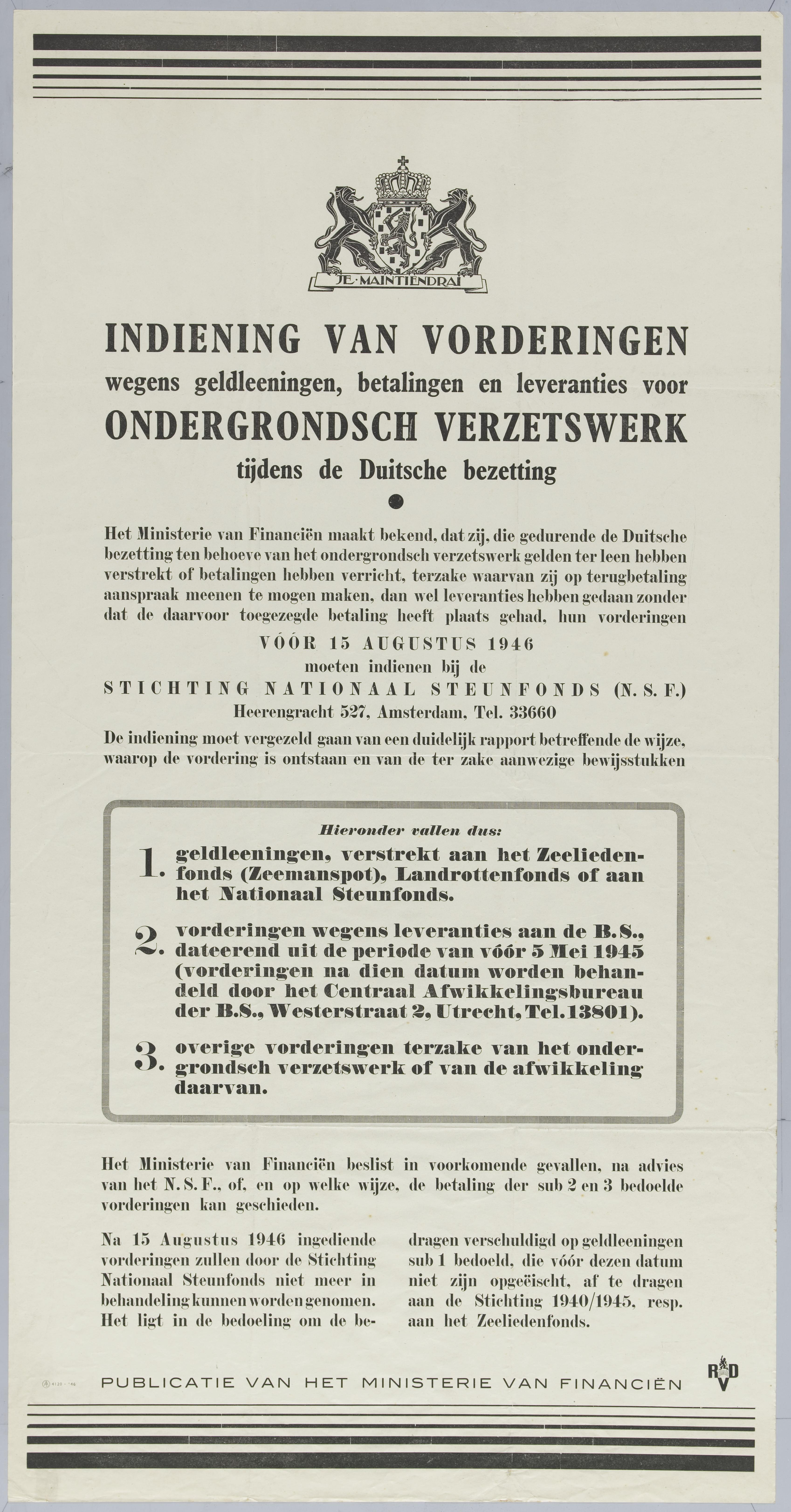 Indiening van vorderingen. Affiche van het Nationaal Steunfonds. Ministerie van Financien. Beeld: Historisch Centrum Leeuwarden.